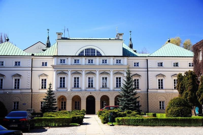 Warszawa (Polska)